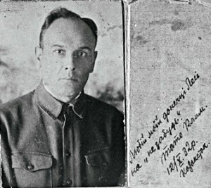 Поліщук Клим: Поліщук Клим